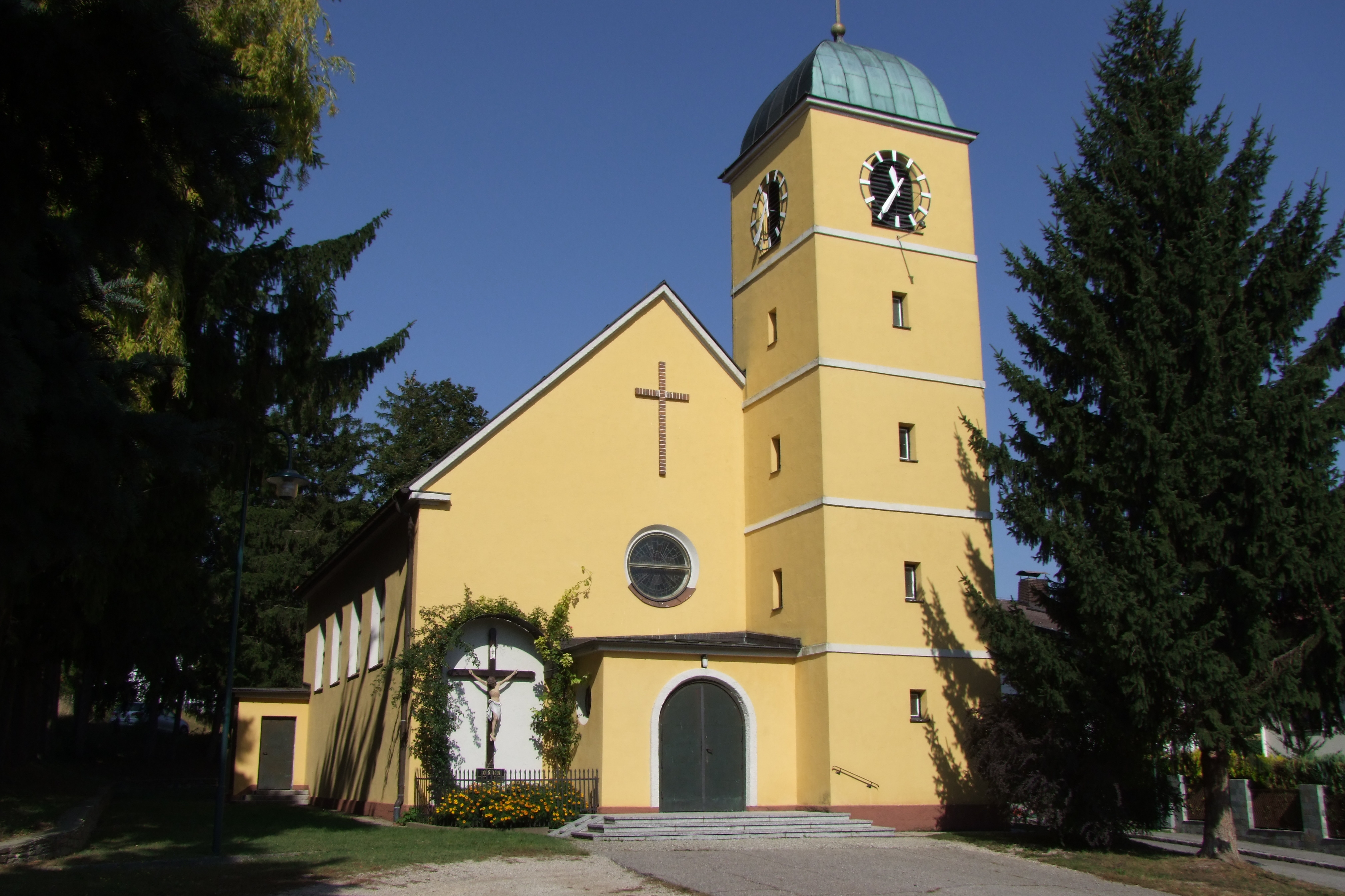 Kath. Pfarrkirche hll. Philipp und Jakob